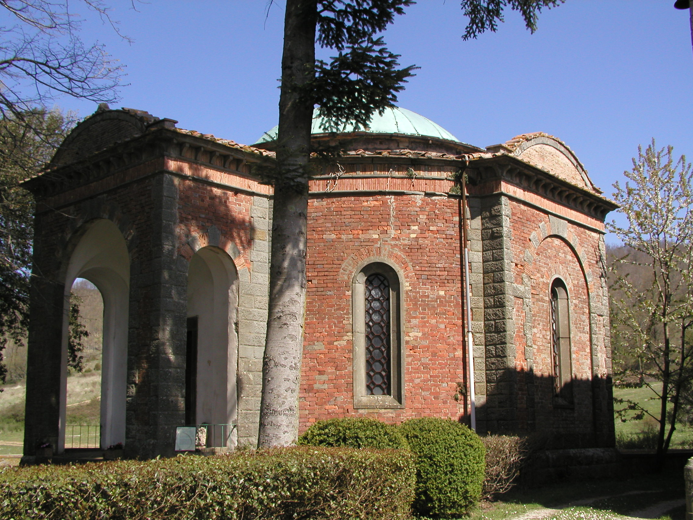 Cappella di Sant'Ottaviano (Fattoria di Bruciano)